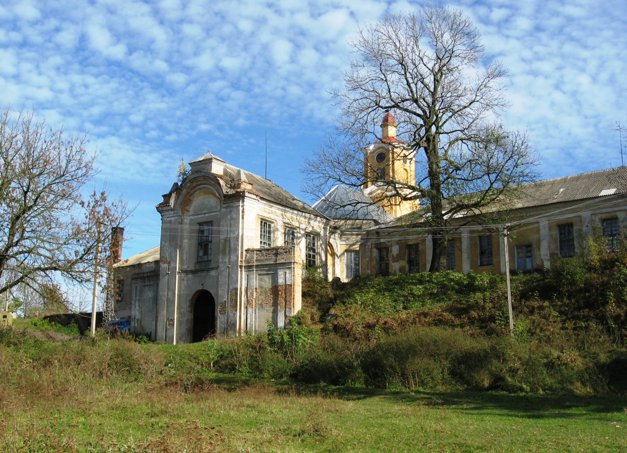 Олика. Замок Радзивиллів. Північно-західна брама